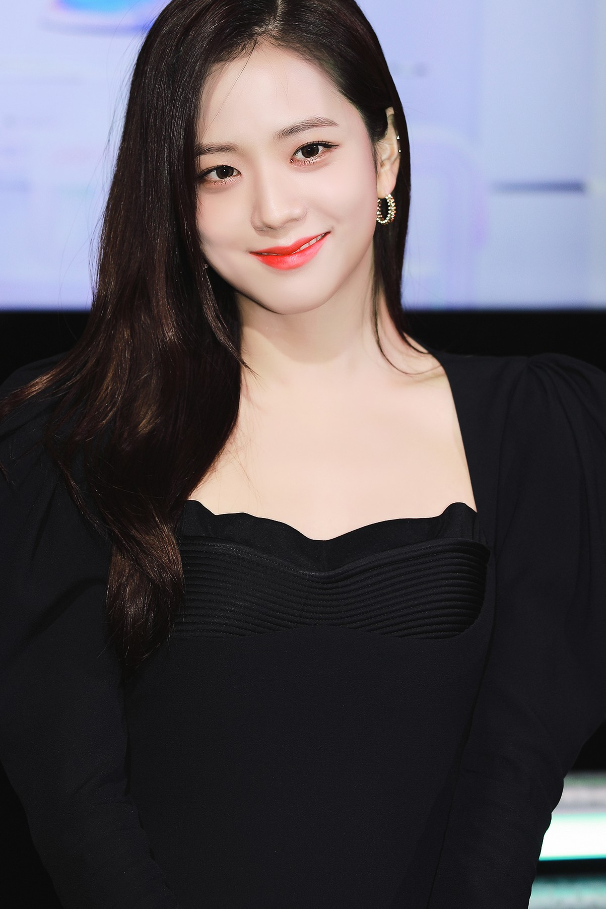 Kim Ji-soo no evento da grife Jimmy Choo, em 9 de janeiro de 2020